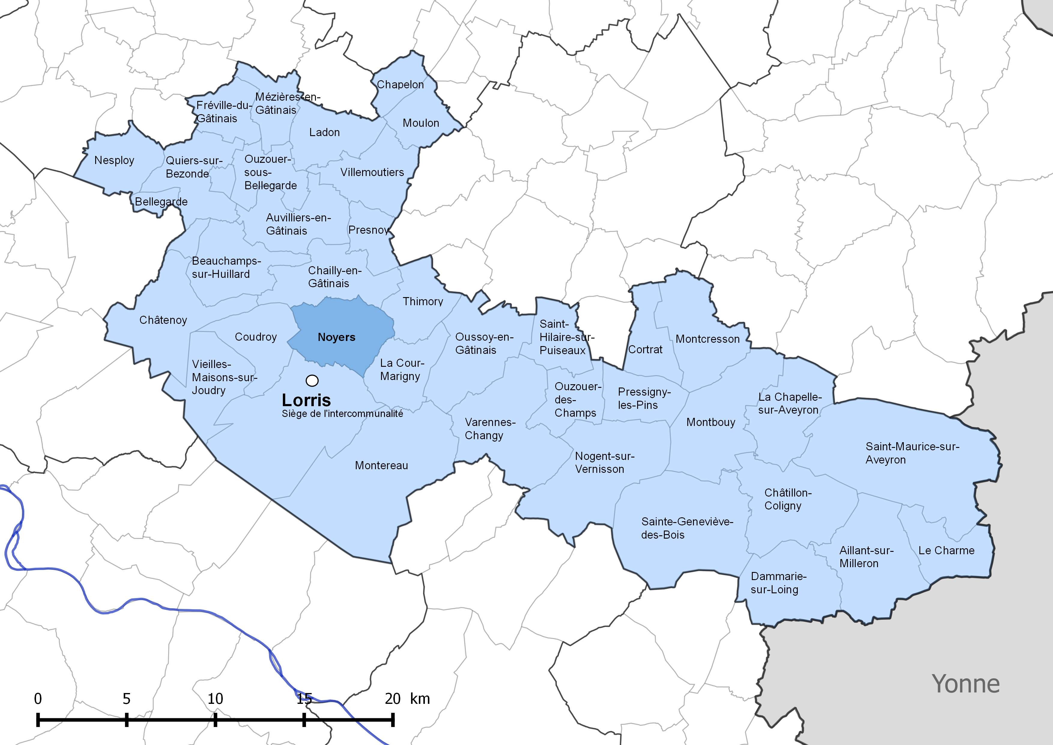 Périmètre de la communauté de communes Canaux et forêts en Gâtinais - Situation de la commune de Noyers (Loiret).